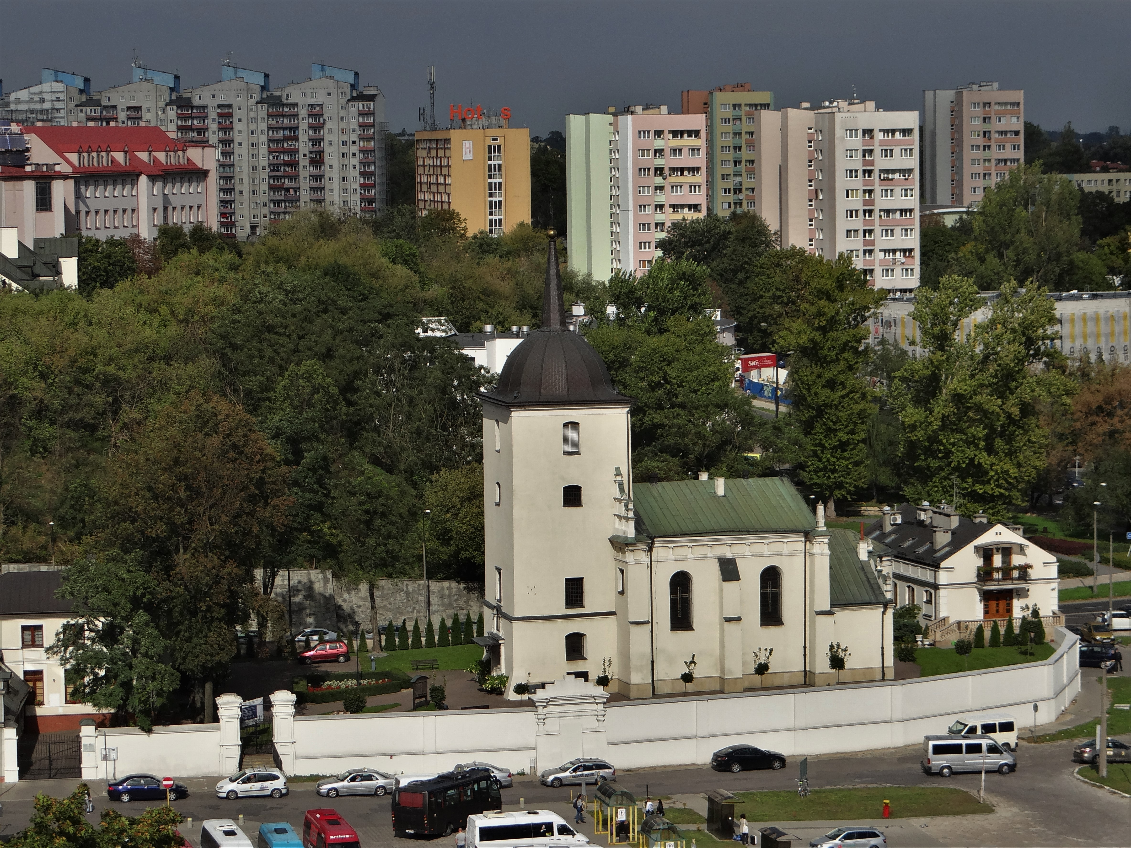 Lublin, Sobór Przemienienia Pańskiego.